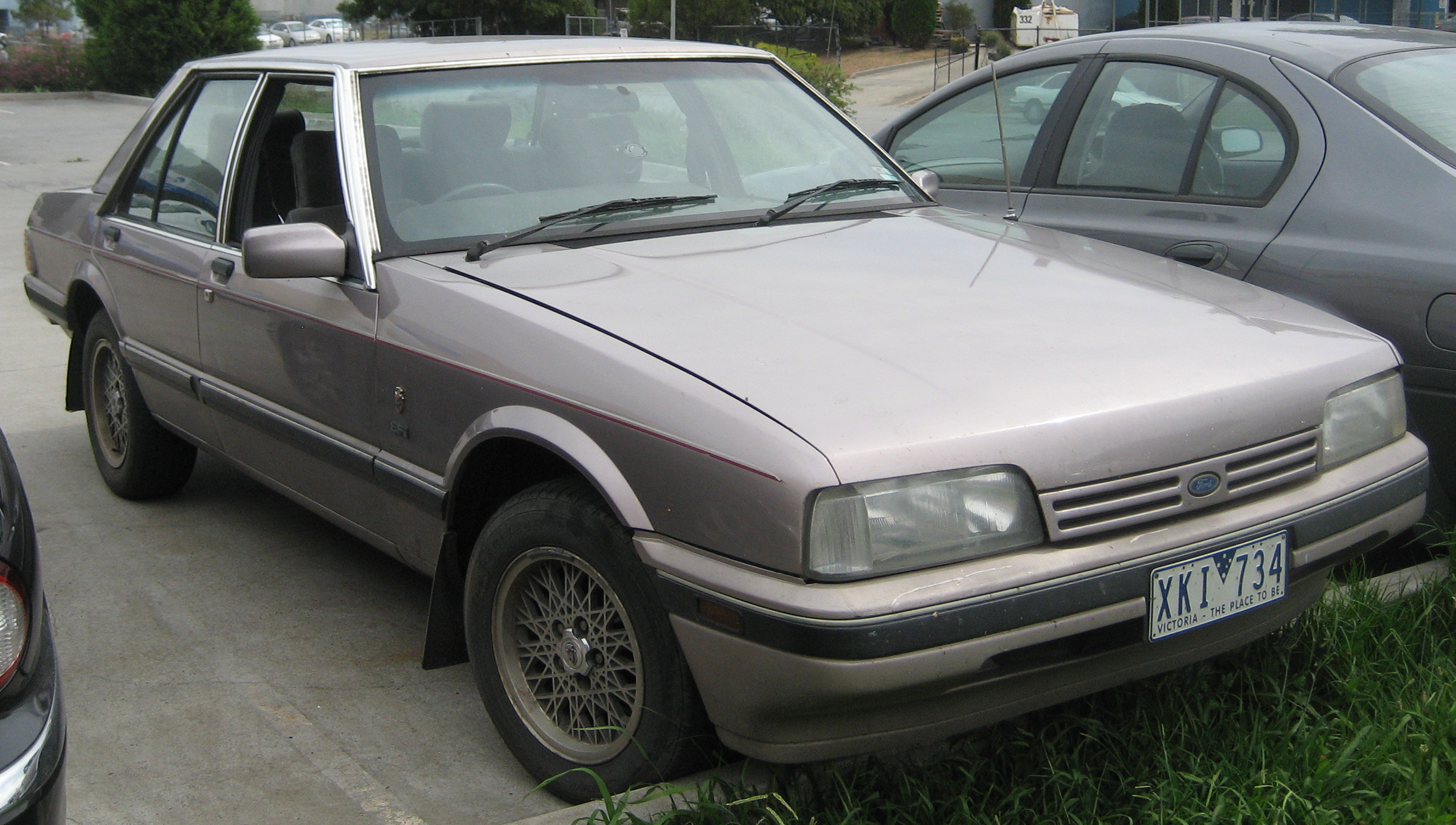 1987 Ford XF Fairmont